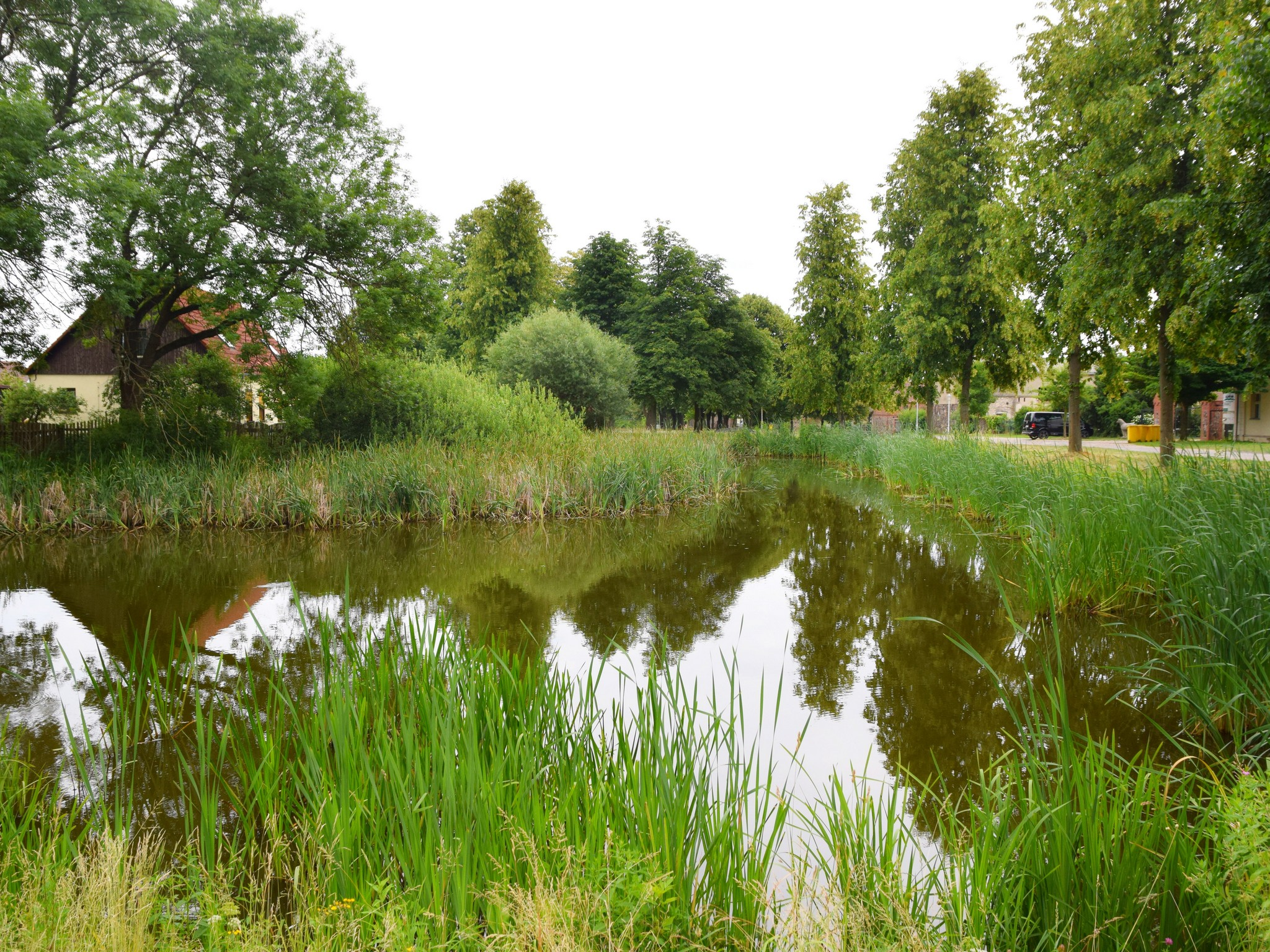 Mittlerer Dorfteich, Frankfurt (Oder)-Hohenwalde